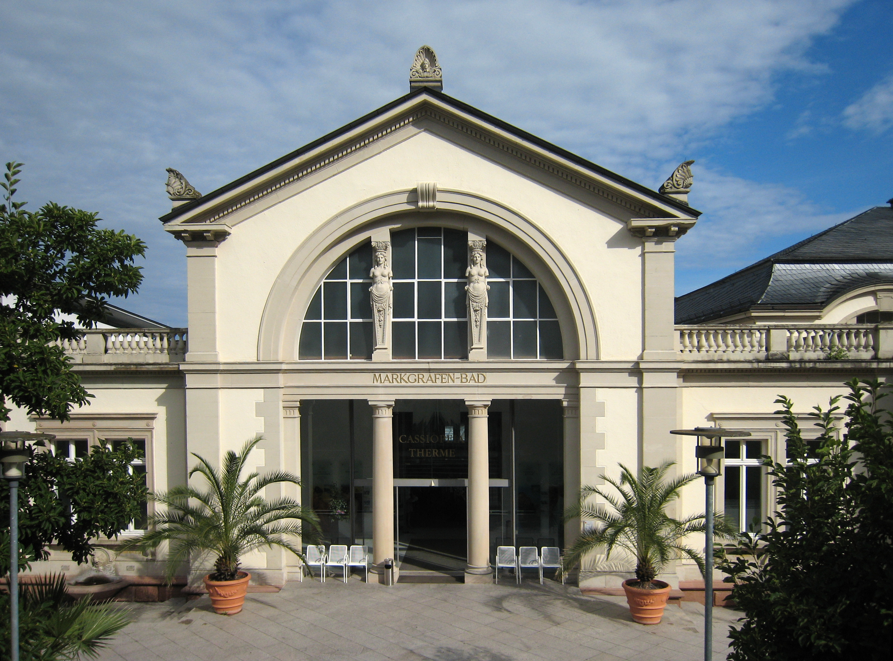 Das ehemalige Marmorbad wurde zum Entree umgebaut. Badenweiler/Süd-Schwarzwald/Deutschland